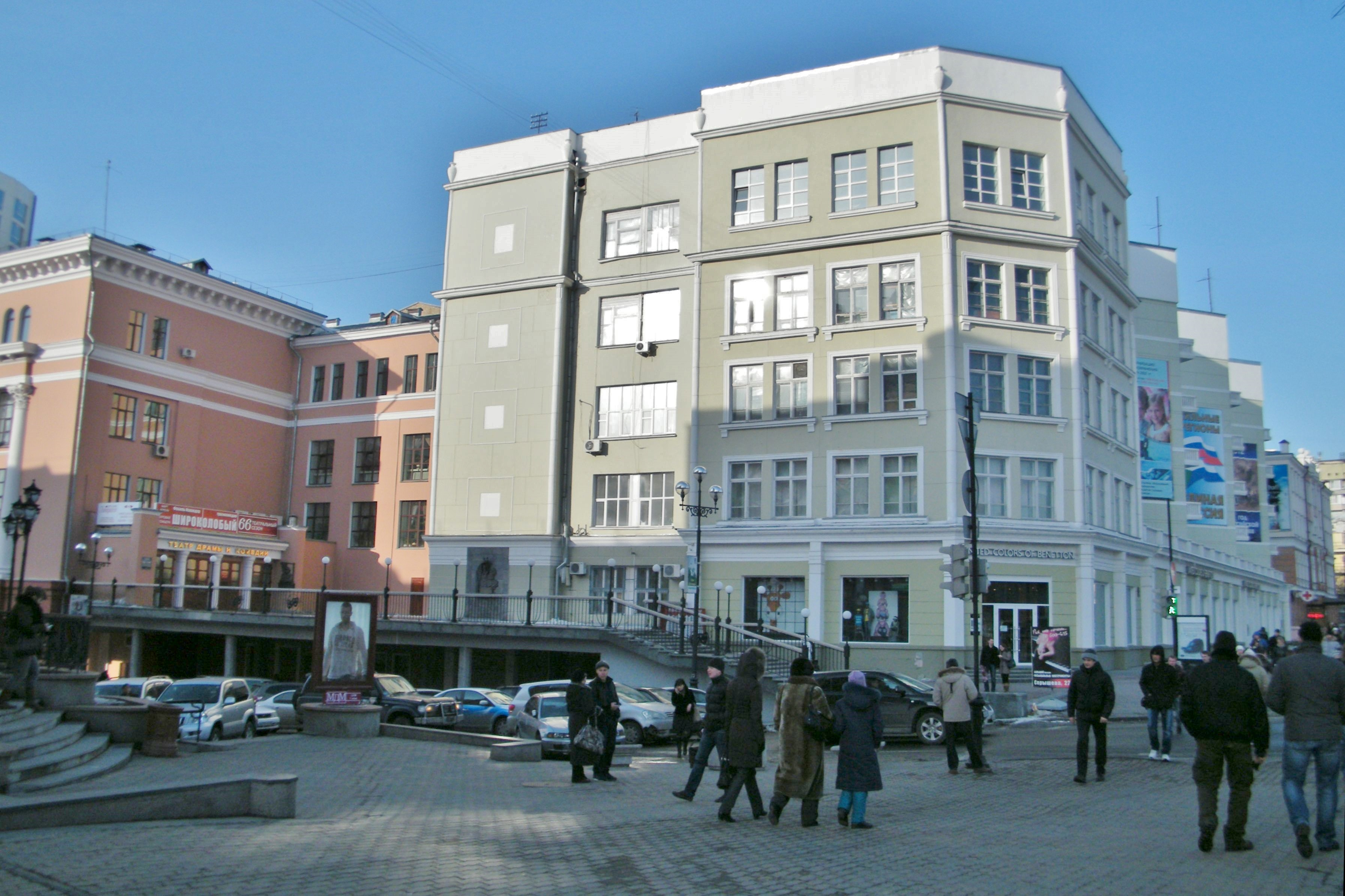 Дом-коммуна в Хабаровске для сотрудников НКВД (1931—1933). улица Муравьёва-Амурского, 25. Встроенный клуб НКВД (сейчас драматический театр), фабрика-кухня (сейчас кафе), спортзал (Детско-юношеская спортивная школа), тир, магазины, швейное ателье. Несмотря на суровый климат, вход в некоторые квартиры происходит с уличных галерей-балконов. Жители очень довольны, вспоминают "добрым словом" тех, кто это придумал.